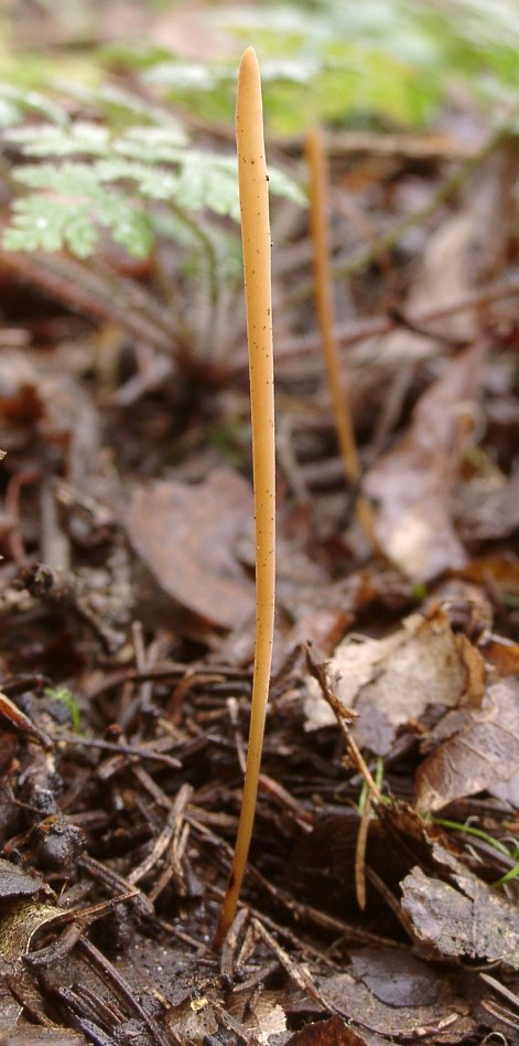 Eine einzelne Hohe Röhrenkeule (macrotyphula fistulosa) aufgenommen in Tuchenbach, Landkreis Fürth bei Nürnberg